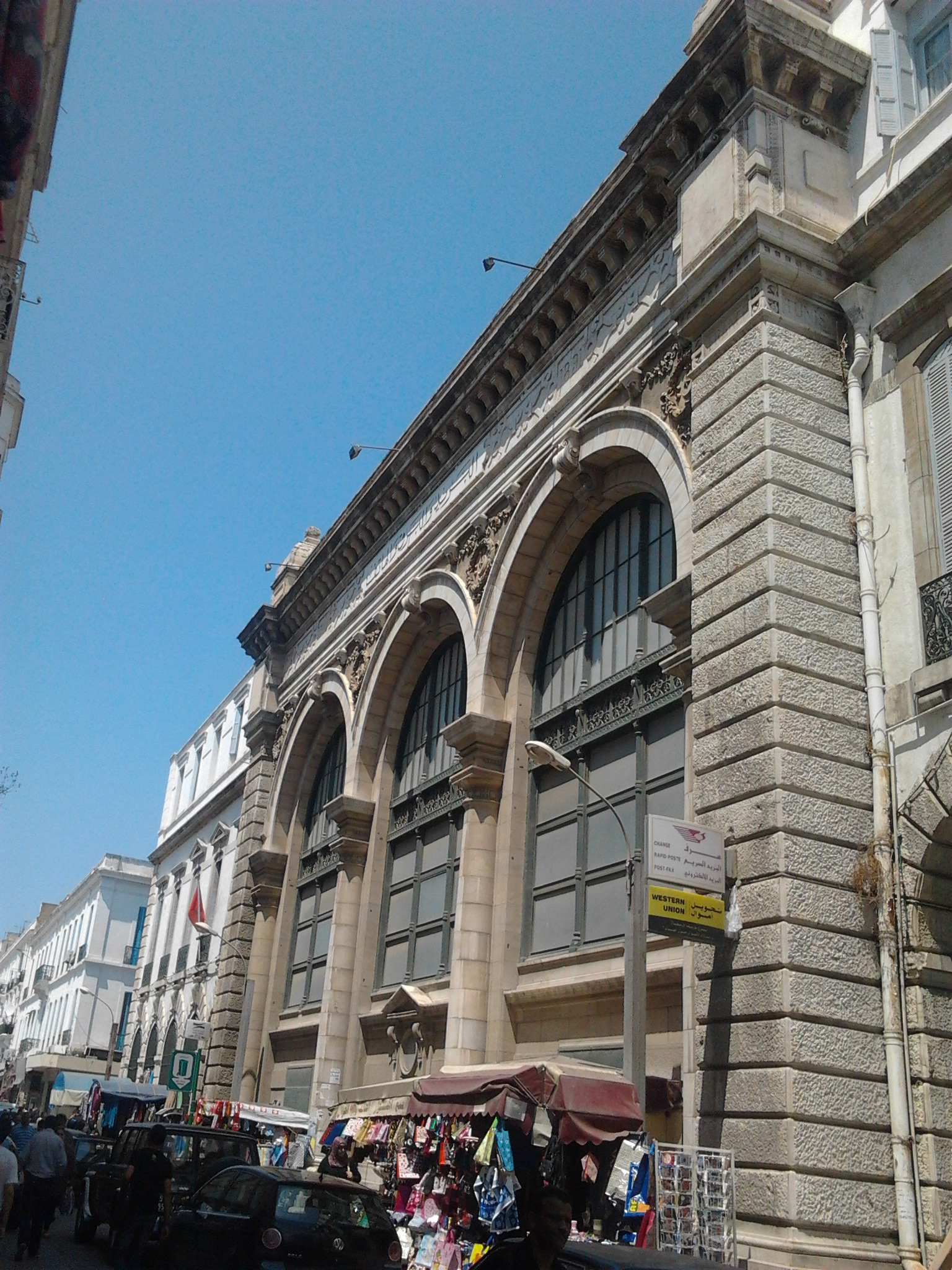 Laposte Tunisienne - Bureau:Tunis Recette Principale - Code postal:1000 - Rue Charle de Gaule - Tunis